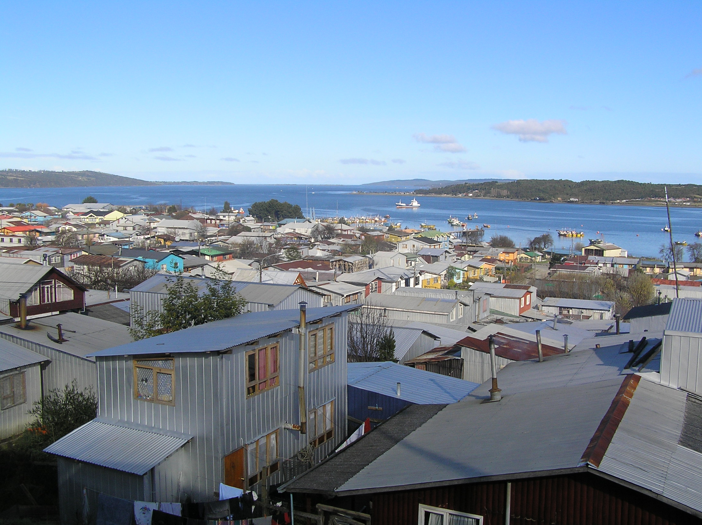 Quellón en Chiloé, Chile.